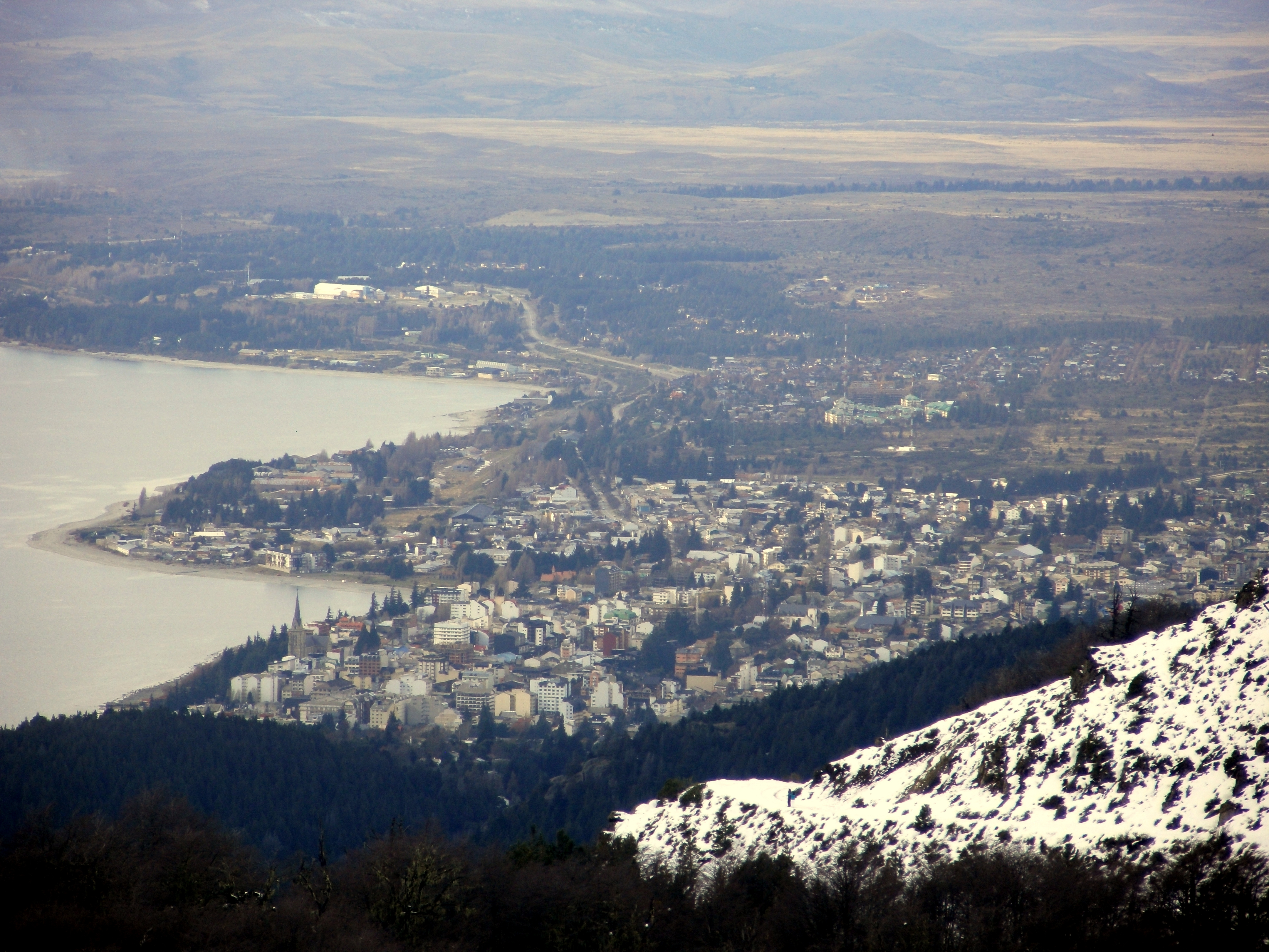 La ciudad barilochense desde el cerro Otto, con su catedral destacándose.